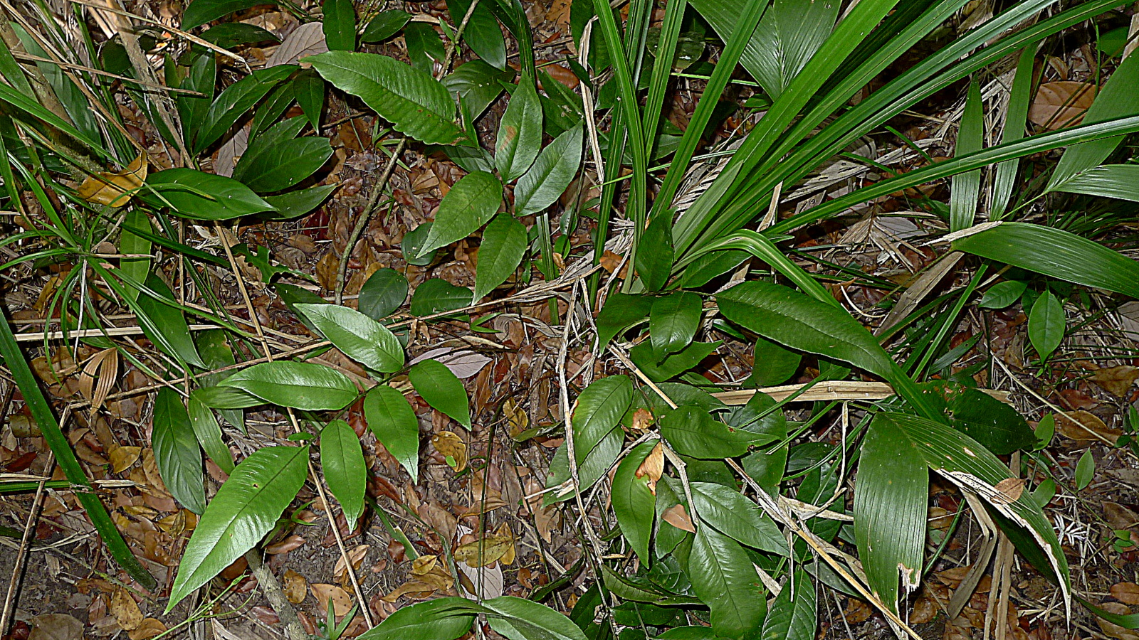 Cyclodium meniscioides (Willd.) C. Presl